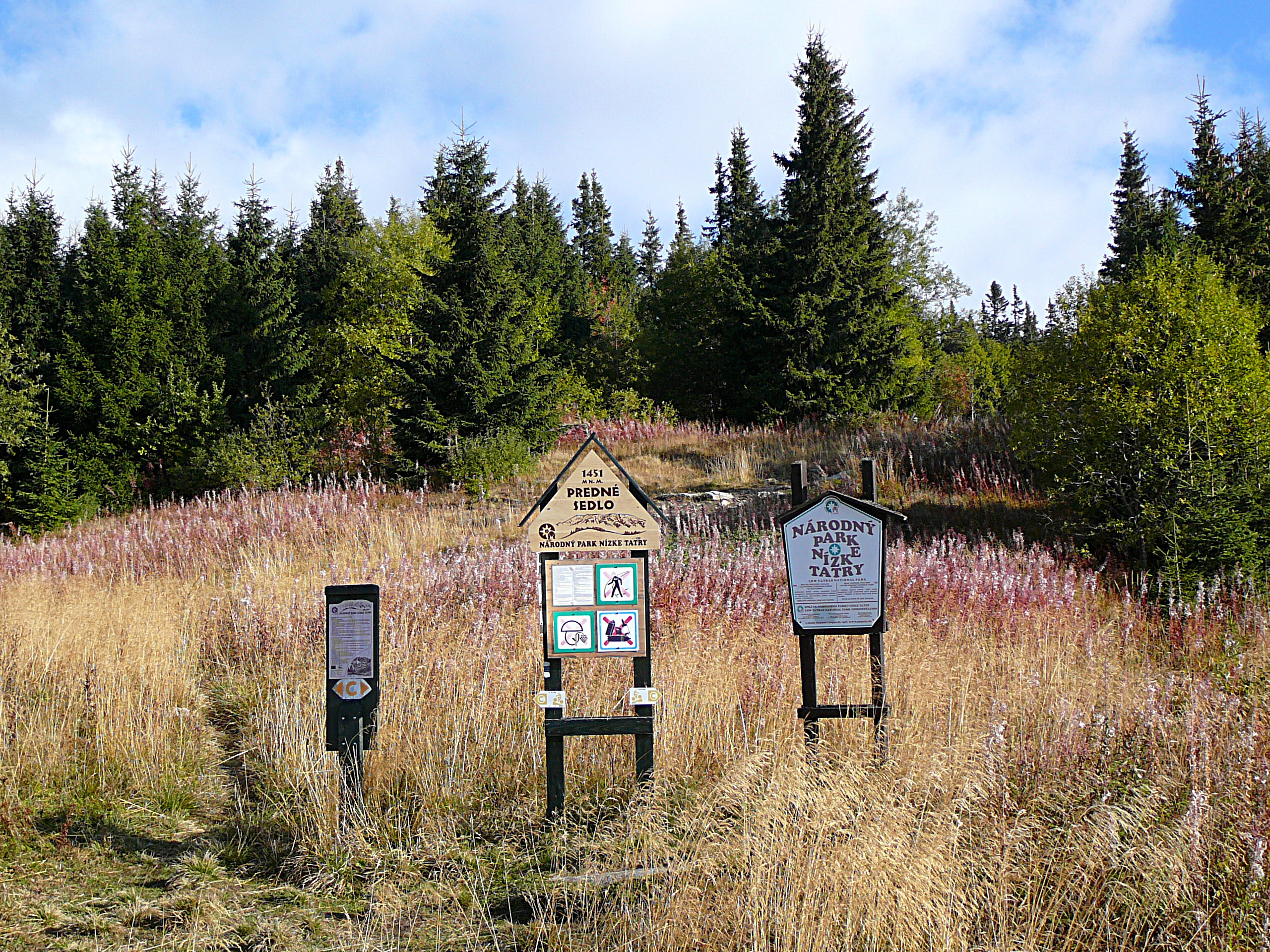 Šumiac - Kráľova hoľa,Predné sedlo